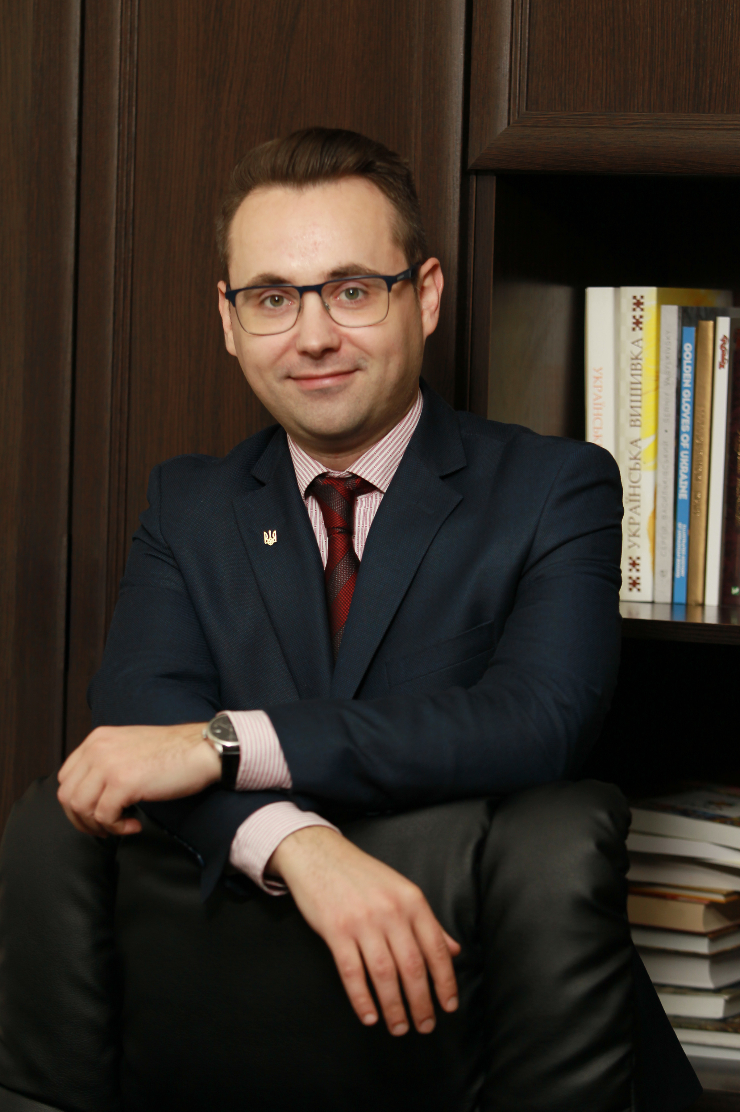 Фото зображує виконуючого обов'язки Ірпінського міського голови Літвинова Андрія Вікторовича, якого 17 листопада було обрано на посаду секретаря Ірпінсьої міської ради. Новий міський лідер добре знаний в гроаді, адже довгі роки був громадським активістом та інніціював значну кількість громадських проектів.